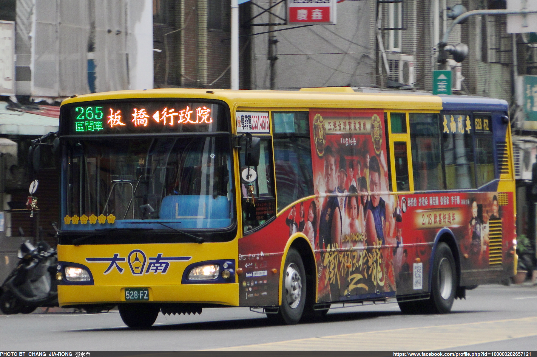 HINO - RK8JRSA - 528-FZ